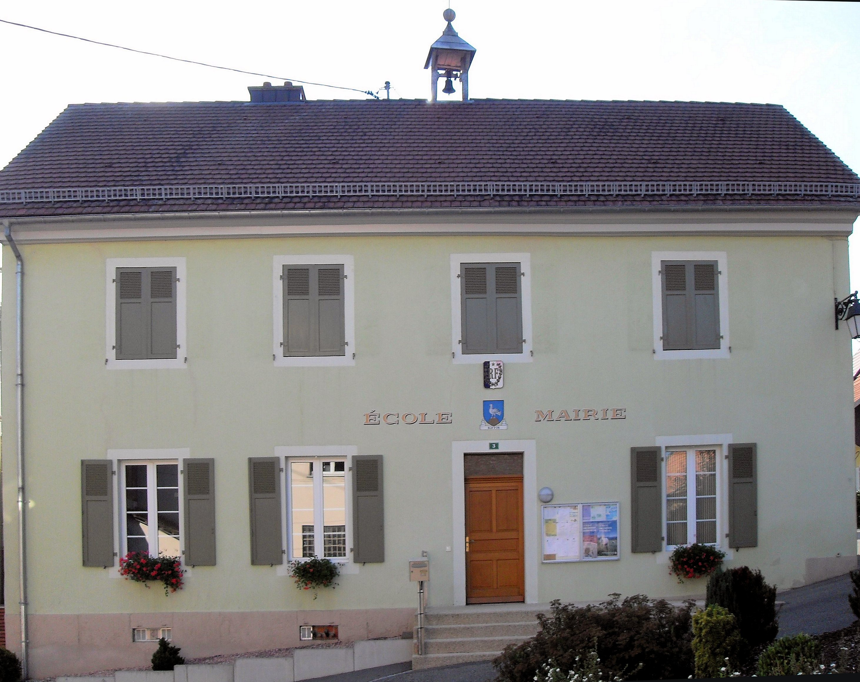 La mairie-école de Kiffis